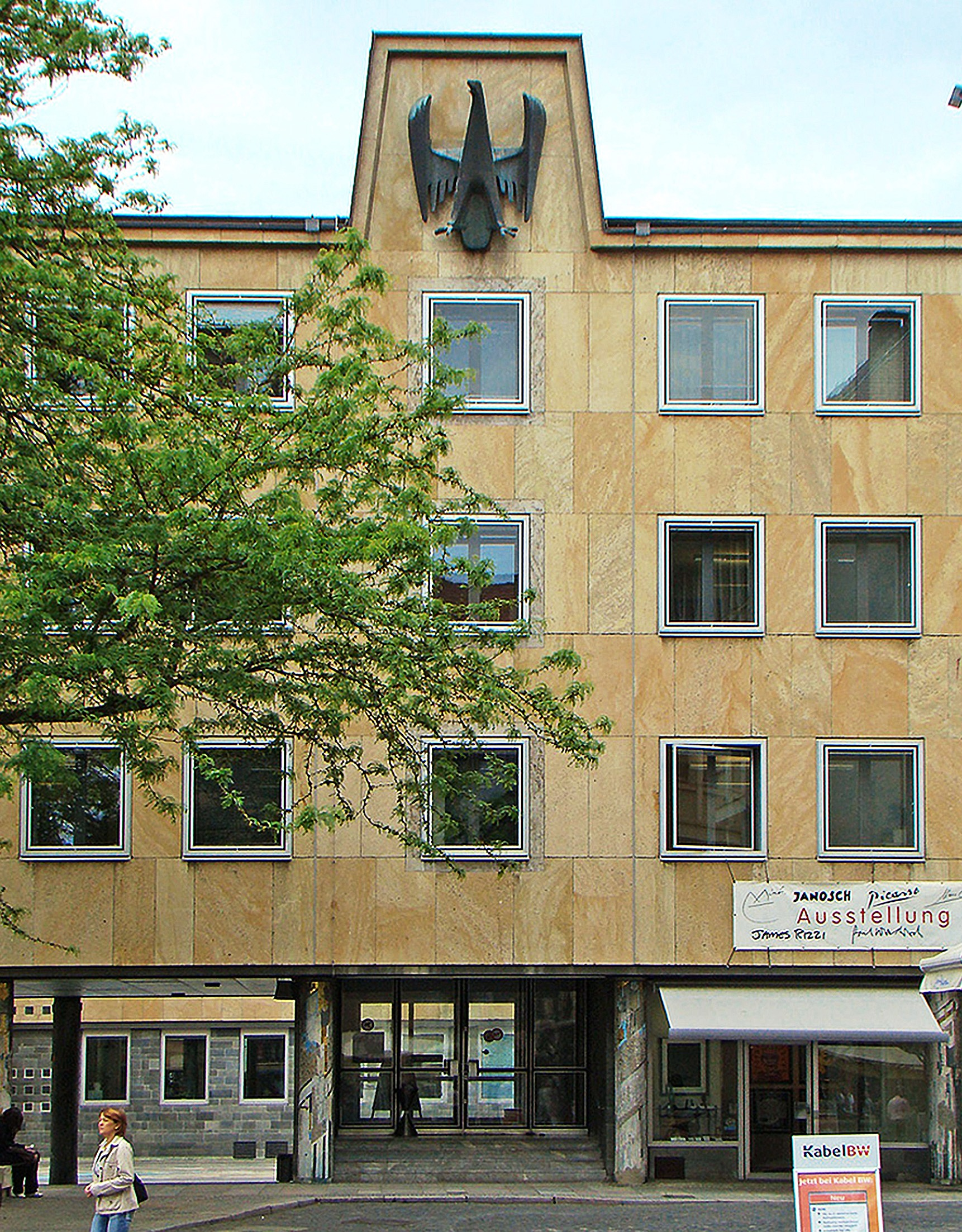 Fassade des Südflügels vom Rathaus-Anbau in Heilbronn